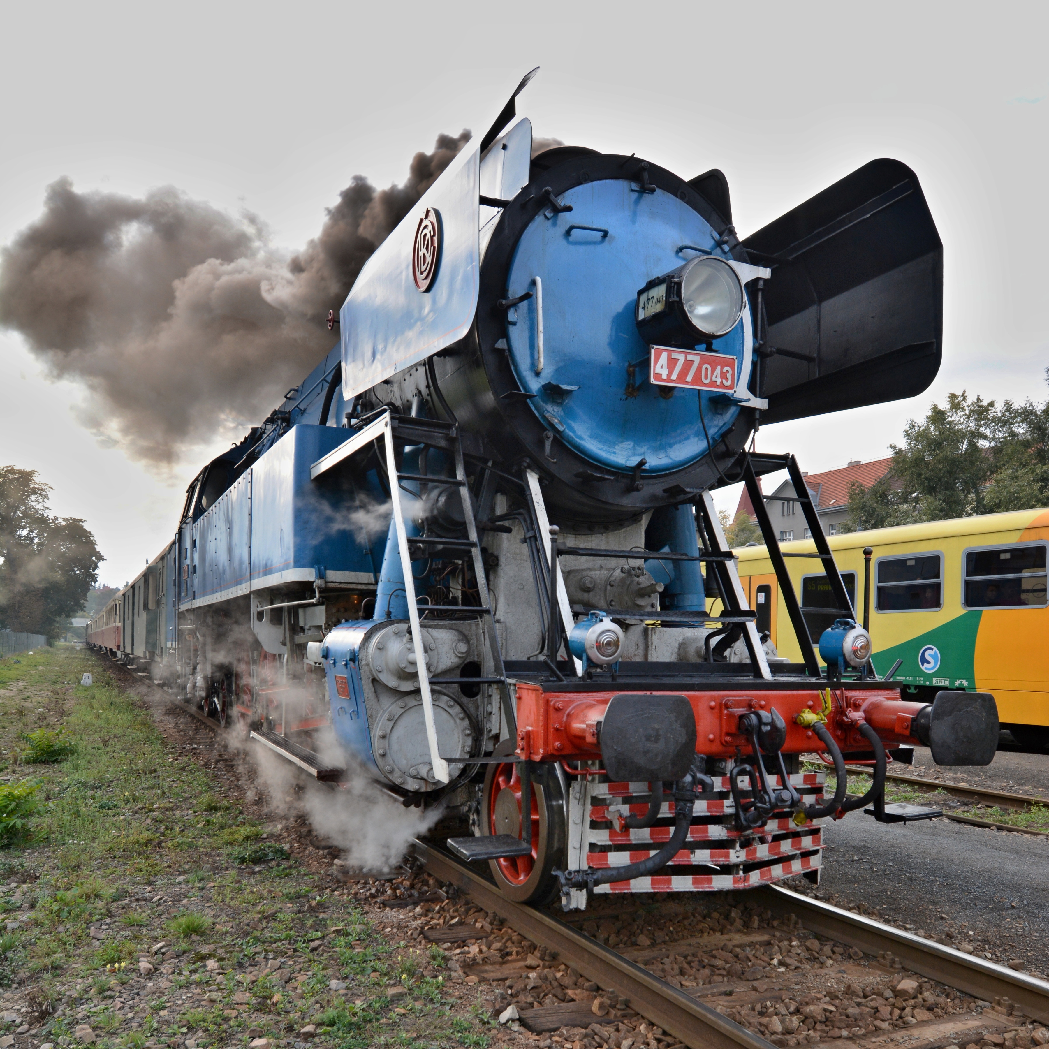 Lokomotiva 477.043 na nádraží Praha - Dejvice.